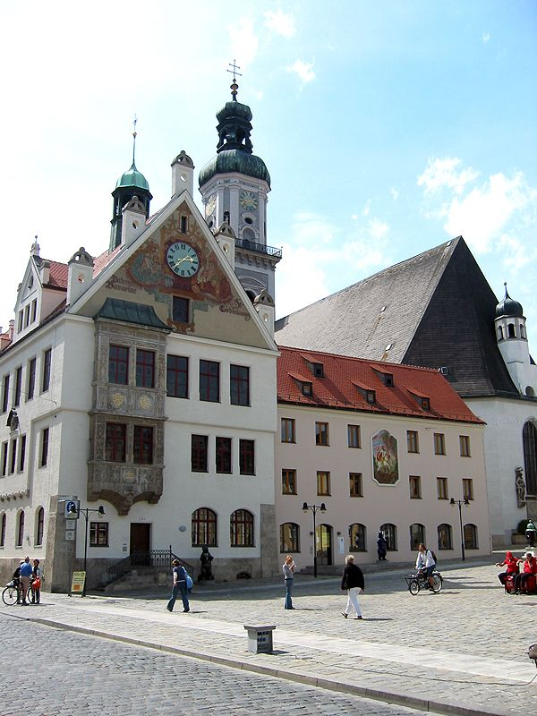 Freising, Rathaus und St. Georg